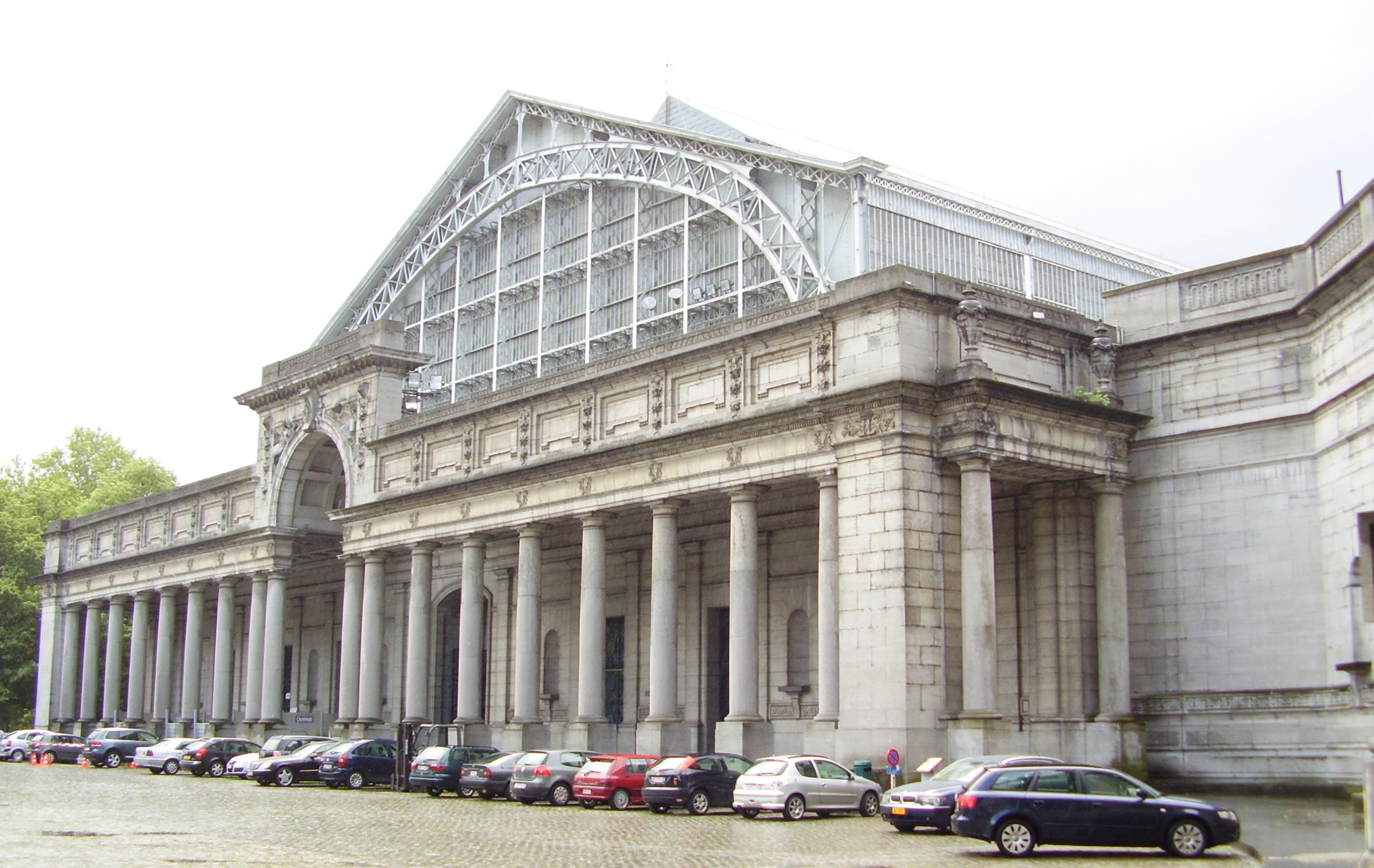 Description: Bâtiment de l'Autoworld, musée de l'automobile - Parc du Cinquantenaire, Bruxelles DE: Gebäude im Brüssleler Jubelpark, in dem sich früher das Mundaneum befand. (S.a.: Palais Mondial) Author: User:Ben2 Date of creation: 31 mai 2006 Source: Photo personnelle